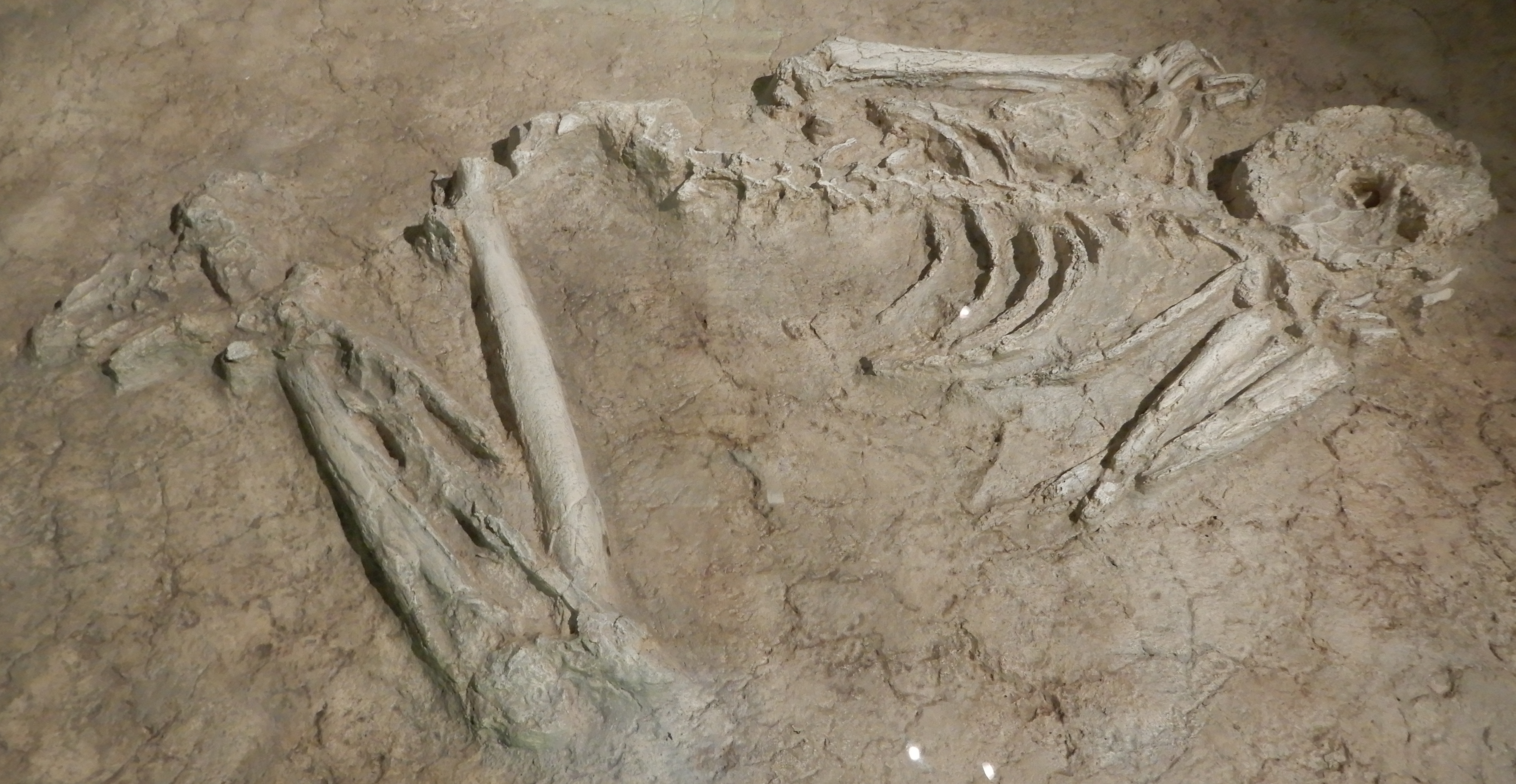 Moulage de la sépulture 007 de Champagne-sur-Oise, "Le Grand Marais". Le fossile original fait partie d'un ensemble de huit sépultures datables du Néolithiques anciens. Il s'agit d'une femme entre 1,54 et 1,62 m. Inhumée en chien de fusil, face contre terre.